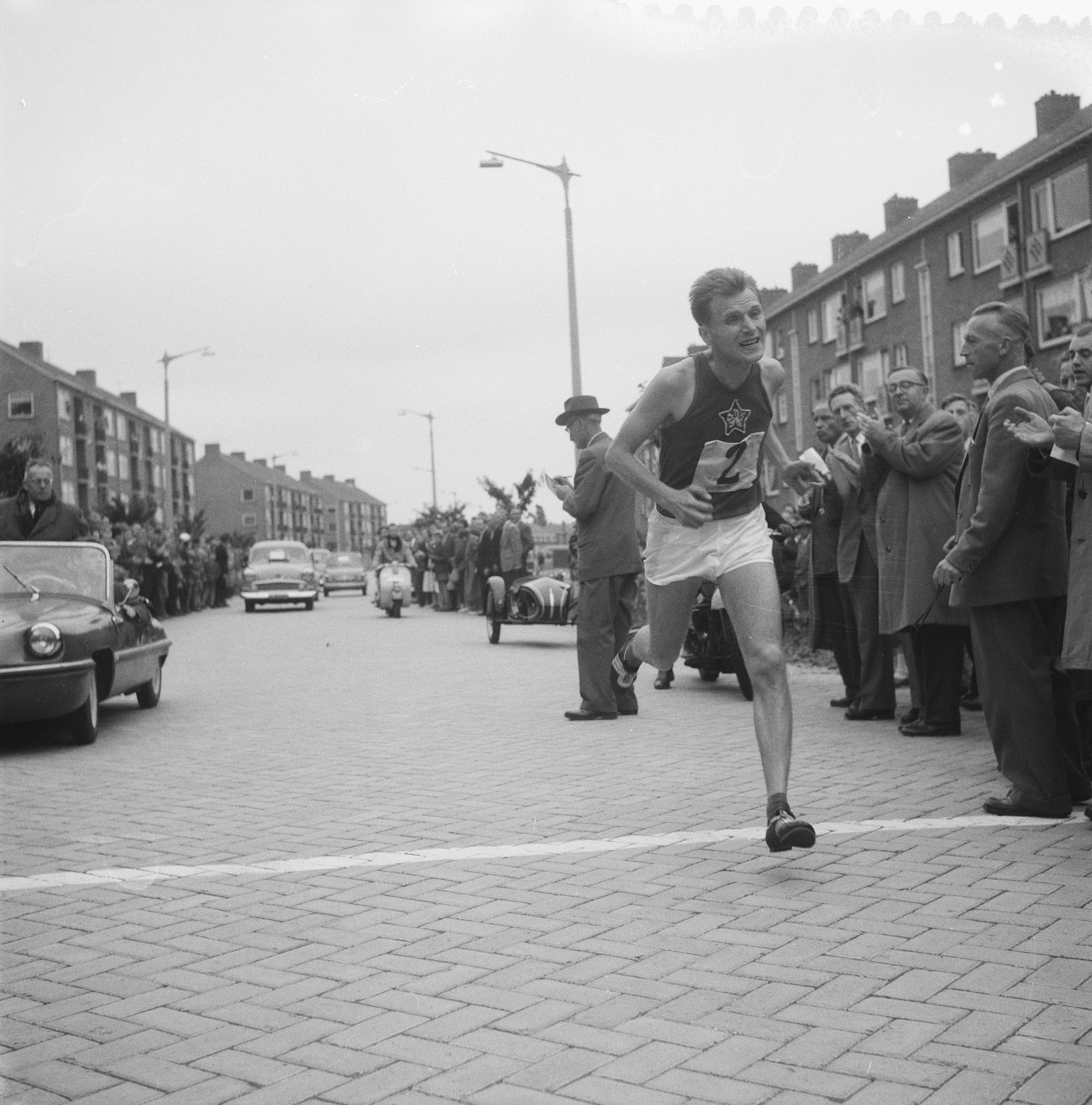 Collectie / Archief : Fotocollectie Anefo Reportage / Serie : [ onbekend ] Beschrijving : Nationale marathonkampioenschap in Zaandam, Kantorek Datum : 5 juli 1958 Locatie : Noord-Holland, Zaandam, Zaanstad Fotograaf : Lindeboom, Henk / Anefo Auteursrechthebbende : Nationaal Archief Materiaalsoort : Negatief (zwart/wit) Nummer archiefinventaris : bekijk toegang 2.24.01.03 Bestanddeelnummer : 909-6882